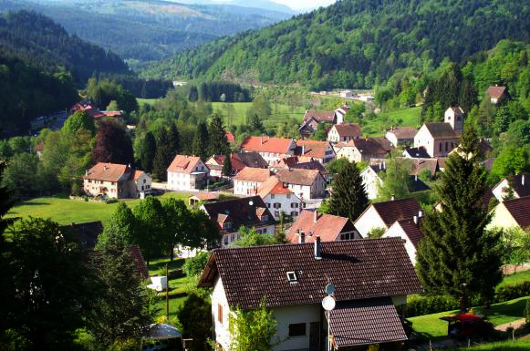 Panorama de Fouday (Bas-Rhin, Alsace, France).